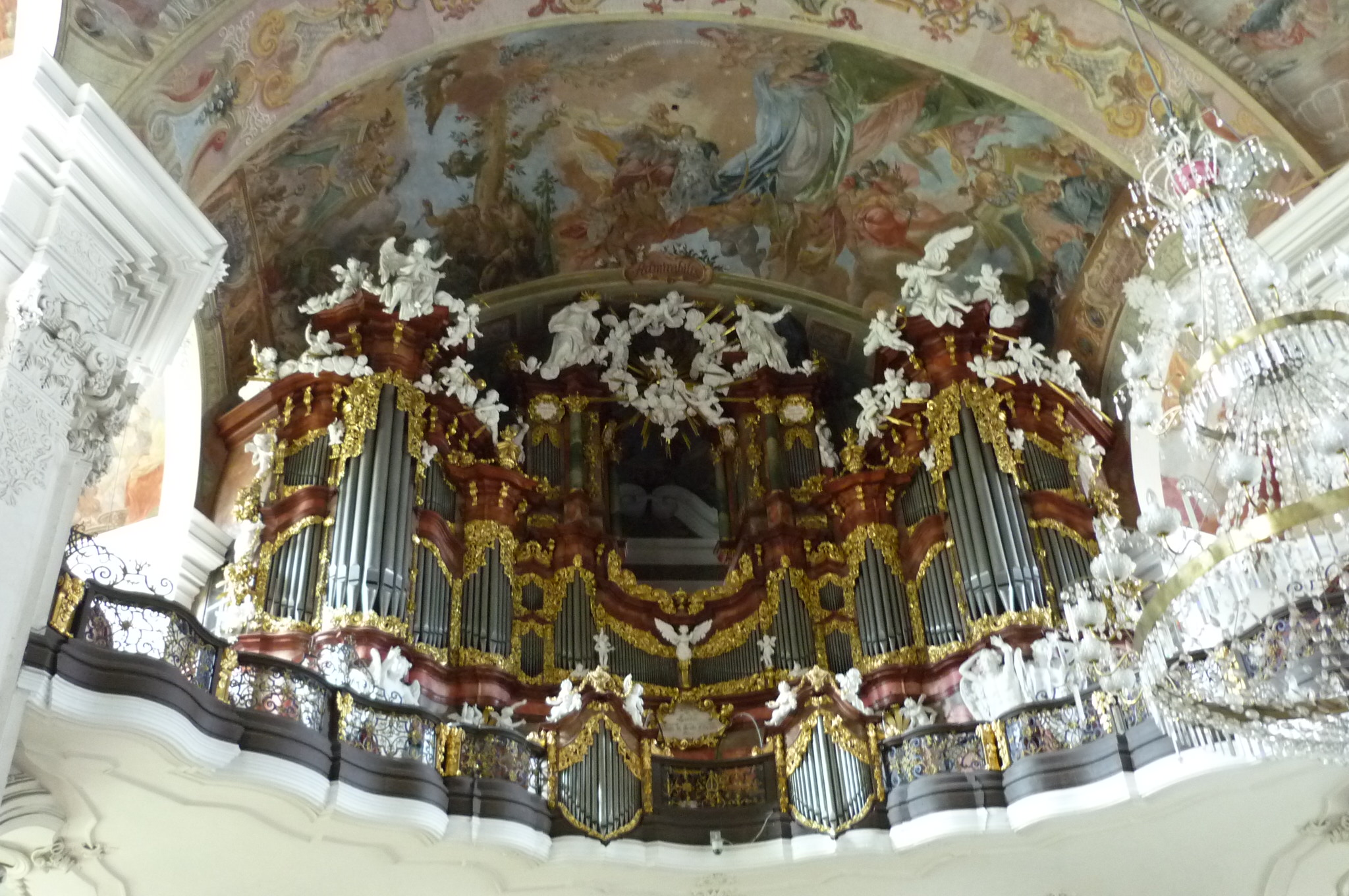 Krzeszów - kościół parafialny Wniebowzięcia NMP (d. klasztorny NMP Łaskawej)